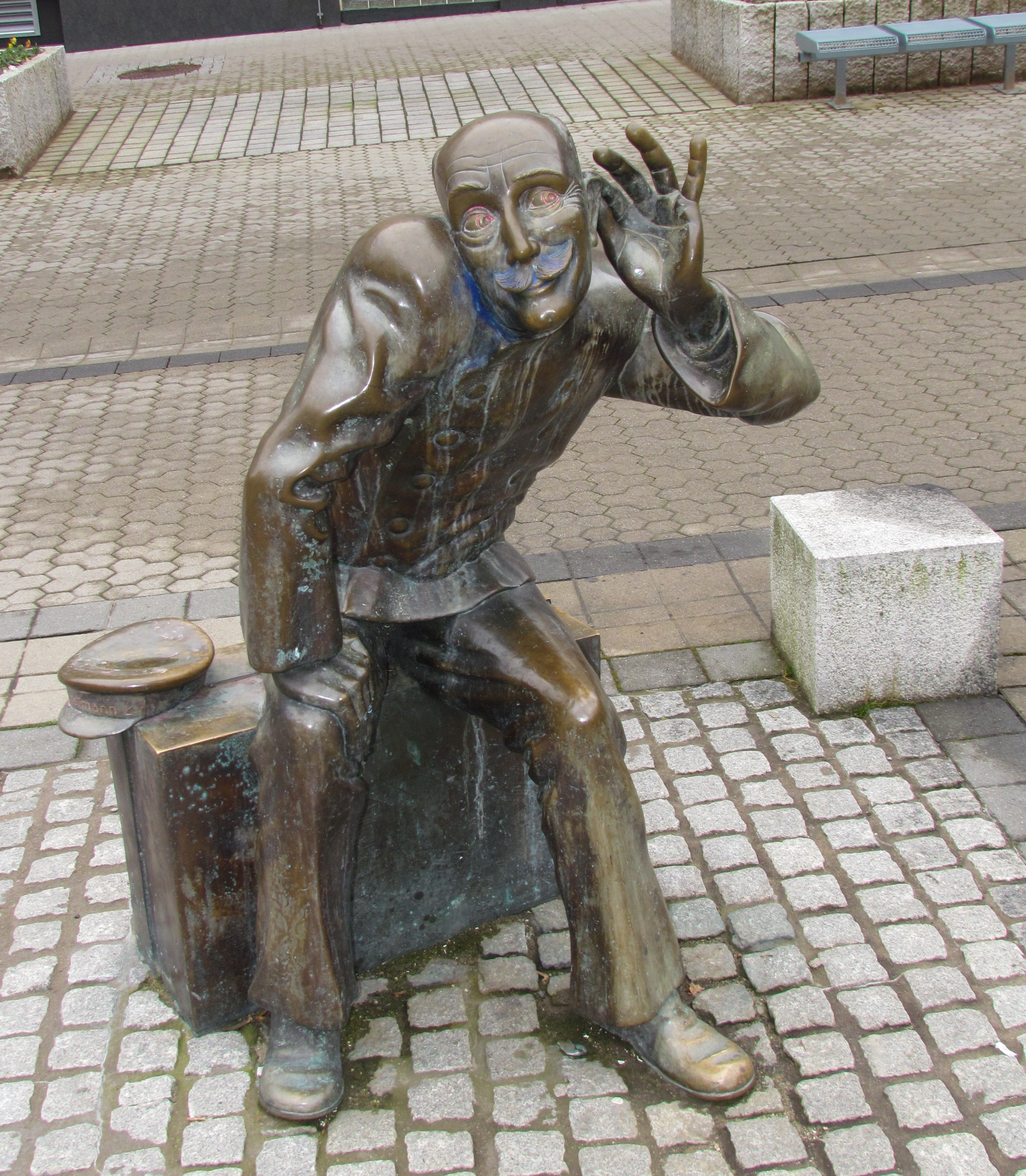 Bildinhalt: Denkmal für Eduard Senz im Hammergraben an der Pasteurstraße, aufgestellt im Dezember 1994. Künstler: Werner Schorr. Aufnahmeort: Neunkirchen, Saarland